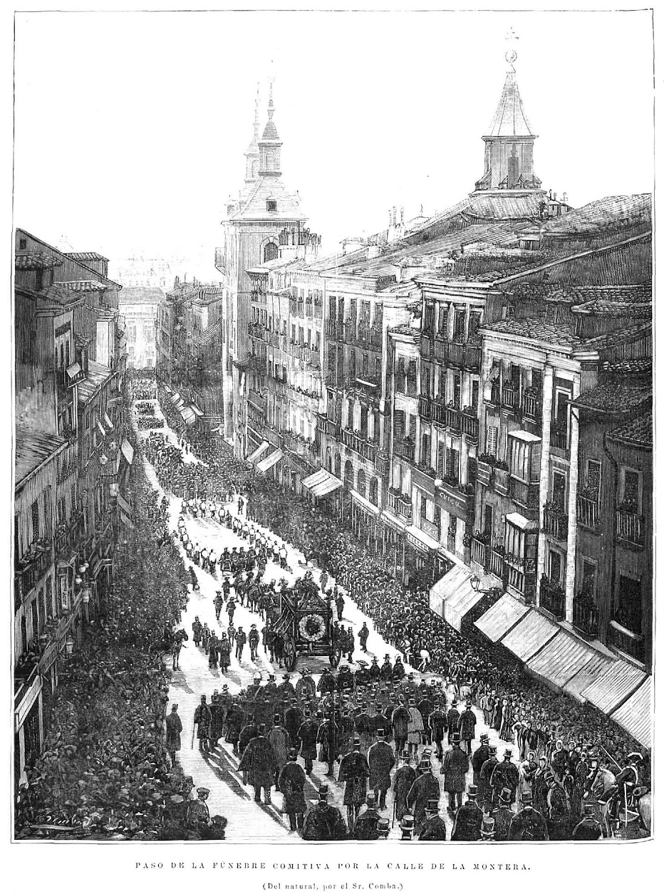 Madrid, entierro de Zorrilla, paso de la fúnebre comitiva por la calle de la Montera, en la revista La Ilustración Española y Americana.